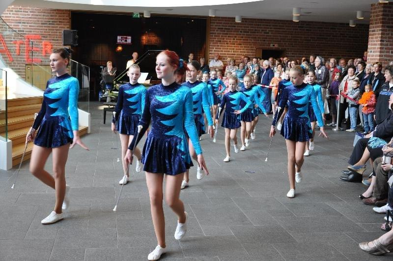 Majorettes tijdens aubade op koninginnedag 2011; Huis van Cultuur en Bestuur Nijverdal